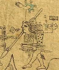 Quinatzin Tlaltecatzin, ruler of Texcoco